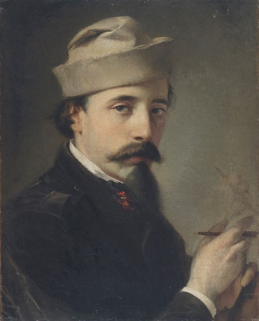 Ritratto dello scultore Odoardo Tabacchi, olio su tela, 50 x 40 cm., coll. privata